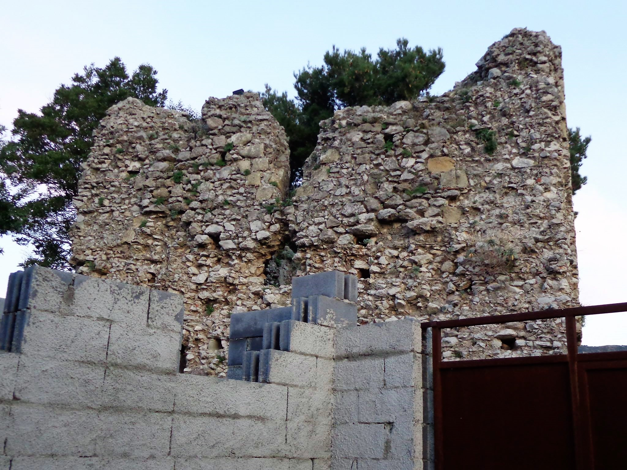 Castello di Novara di Sicilia, ruderi. Natale 2015, scatto già presente su profilo personale FB.